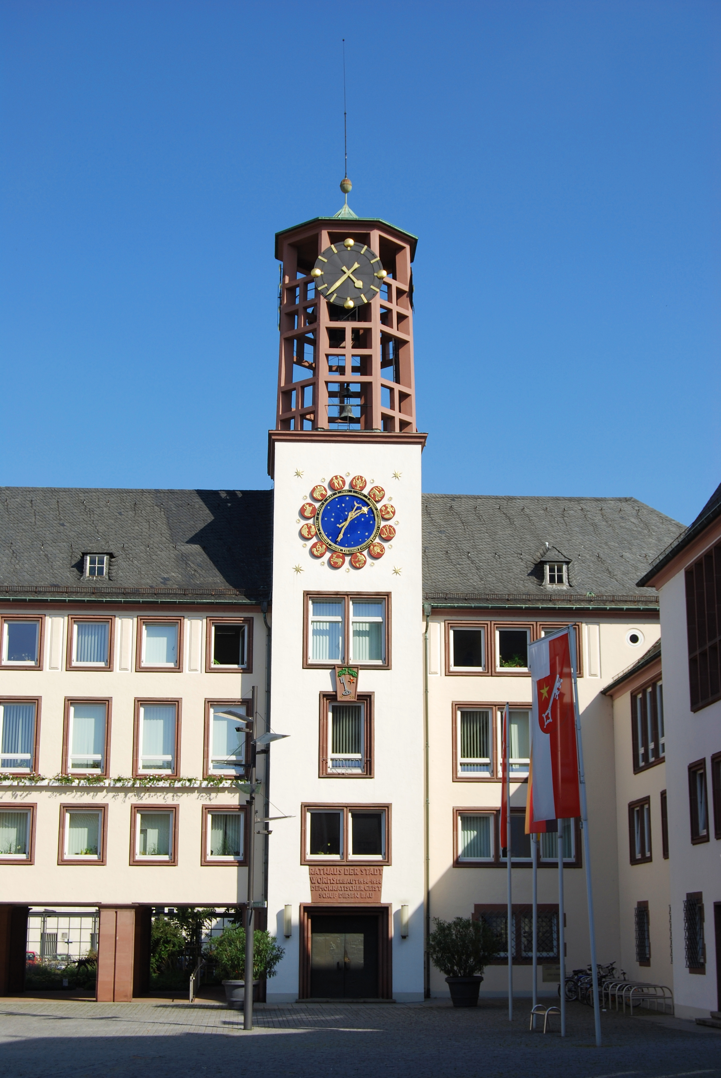 Der Turm des Wormser Rathauses im August 2009.